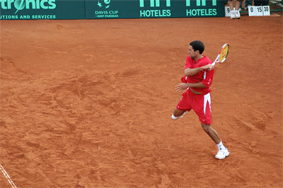 Илия Кушев; Пловдив, Купа Дейвис: България - Кипър 3:2; 2007 Пламен Ташев, Тенис